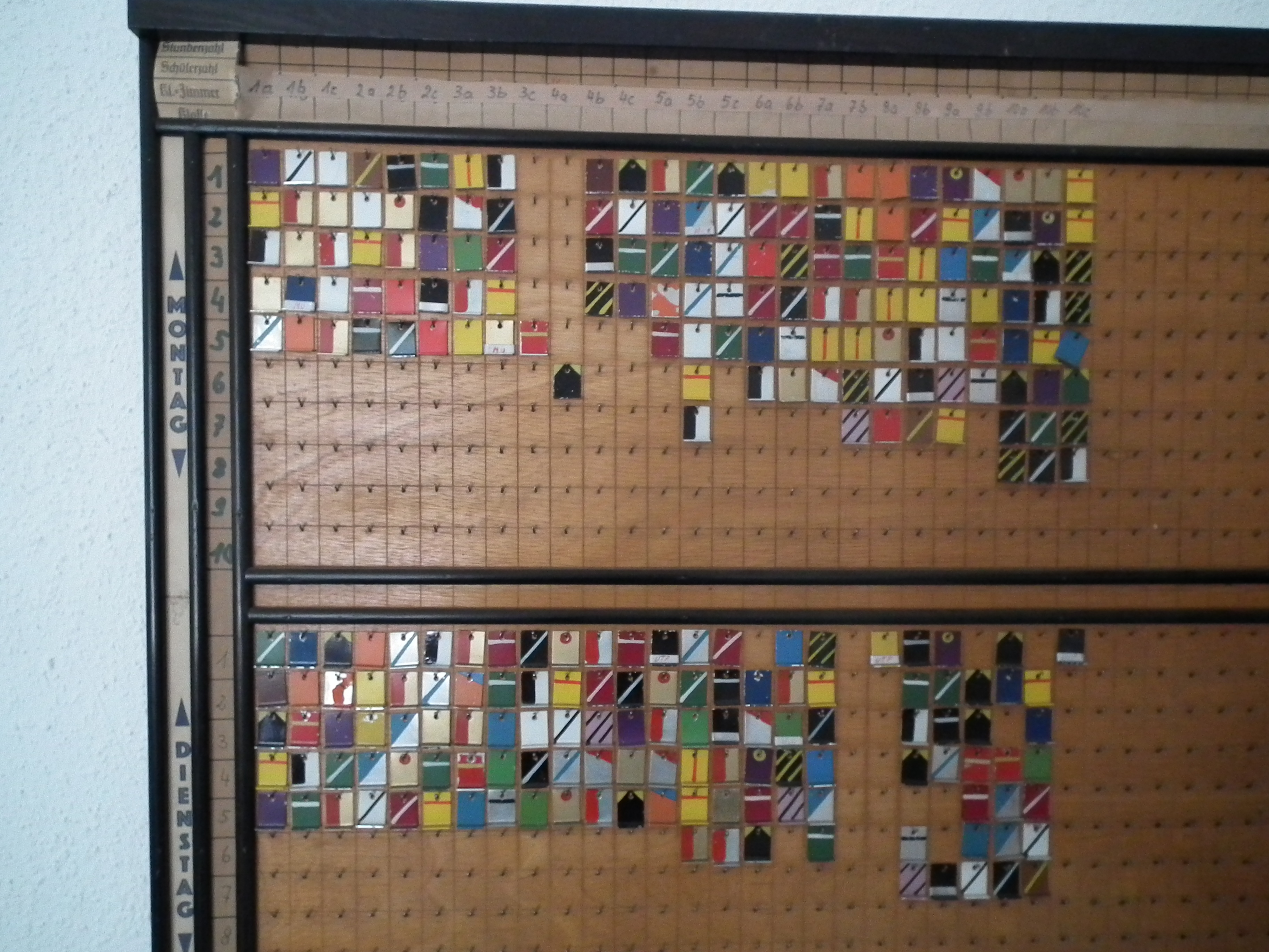 Ebersdorfer Schulmuseum, ein symbolisierter Stundenplan für Lehrer im Lehrerzimmer